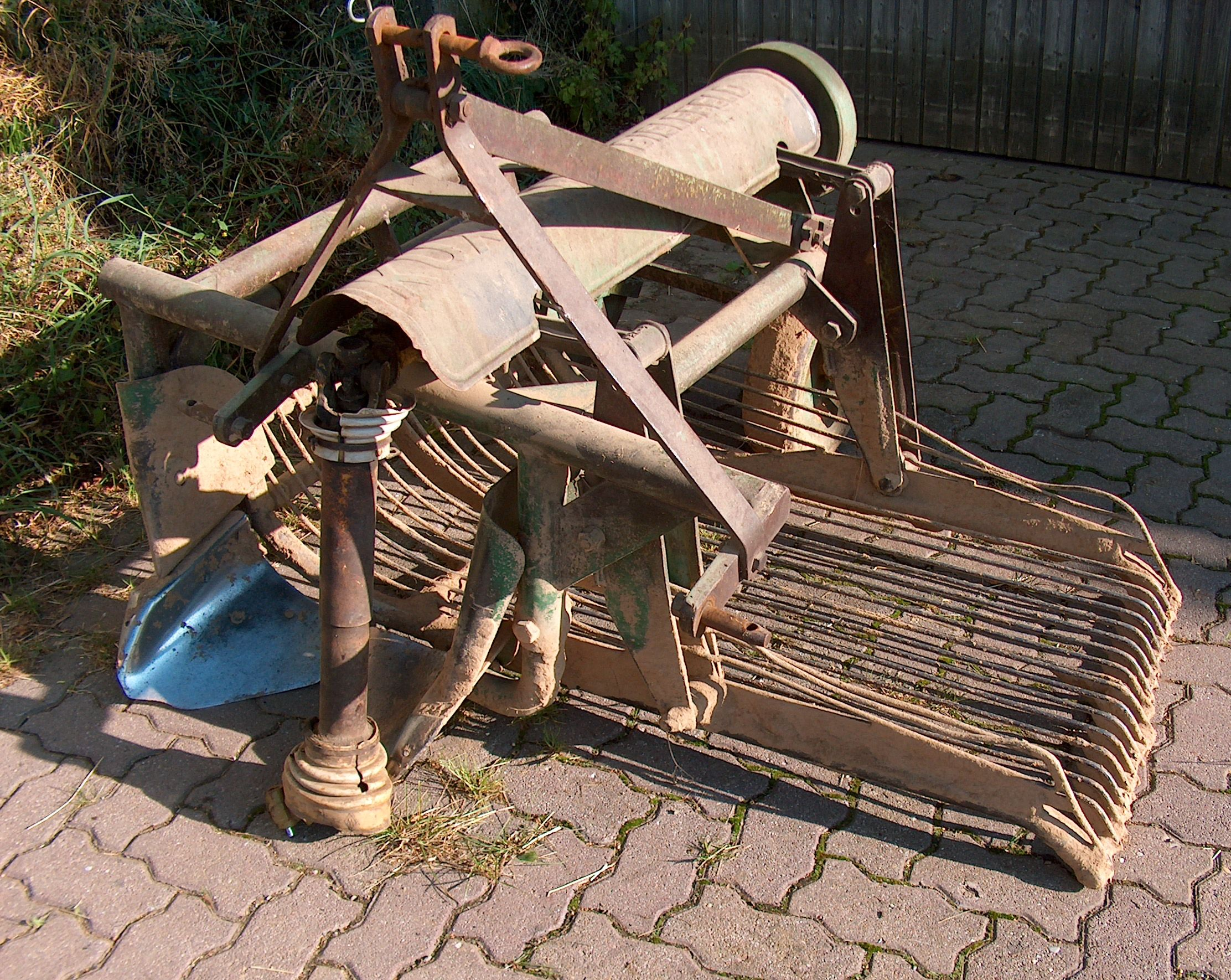 Alter Siebroder von Kuxmann (Bielefeld)